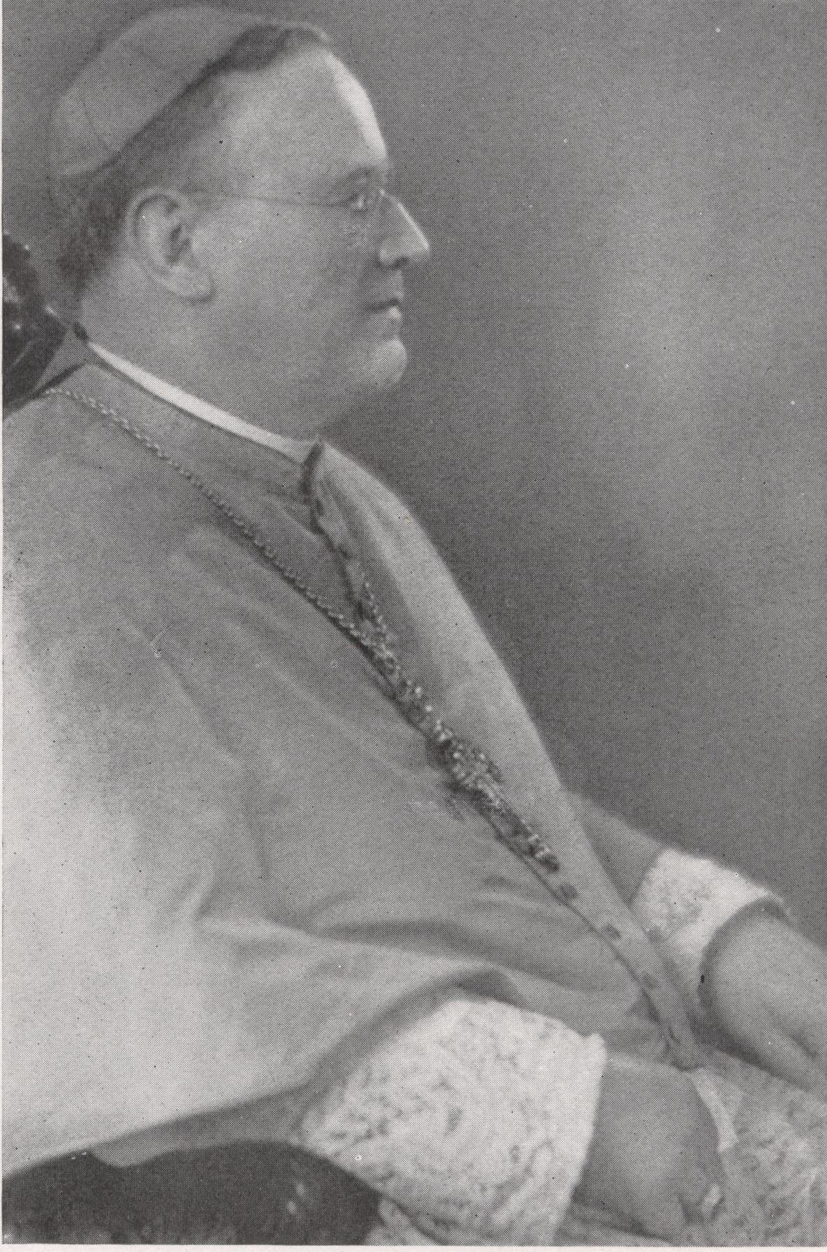 Bischof Joseph Schrembs, Cleveland, geboren in Regensburg.